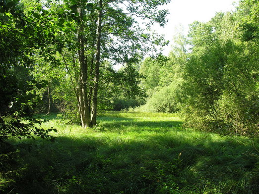 Miško viksvinė pelkė Fotografavo Algirdas Mažeikių raj., Ubagyno miške, 2005 m., rugpjūčio 23 d.